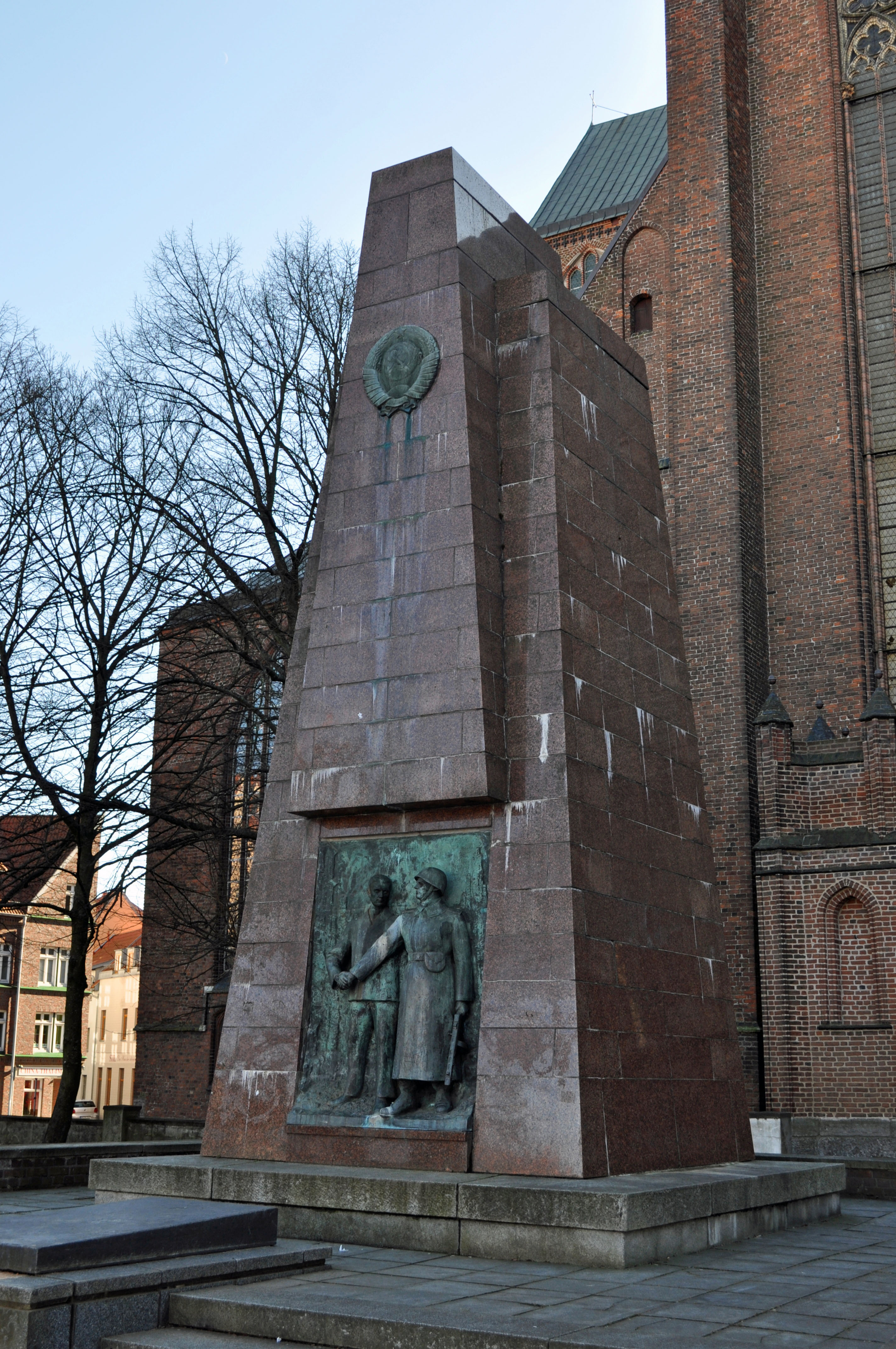 Gebäude bzw. Gebäudedetail in Stralsund. Straße und Hausnummer siehe Dateiname. Das Denkmal ist als Baudenkmal ausgewiesen, siehe dazu die Liste der Baudenkmale in Stralsund.